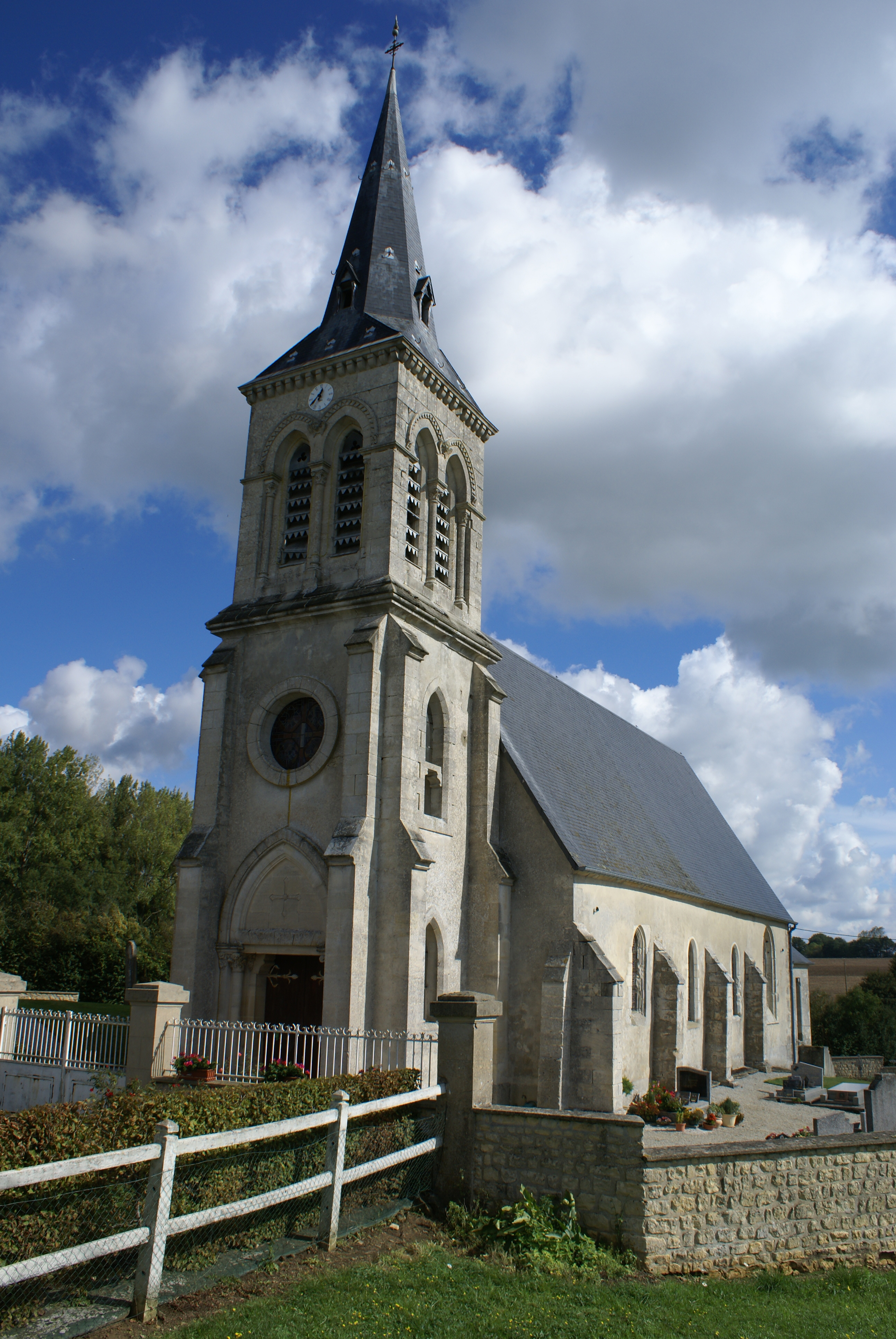 Eglise Saint-Georges